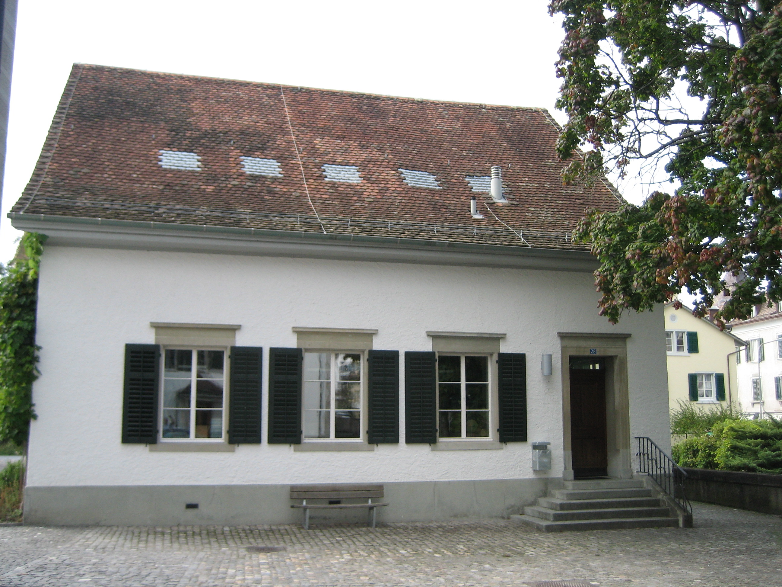 Biohaus, Ansicht von Osten